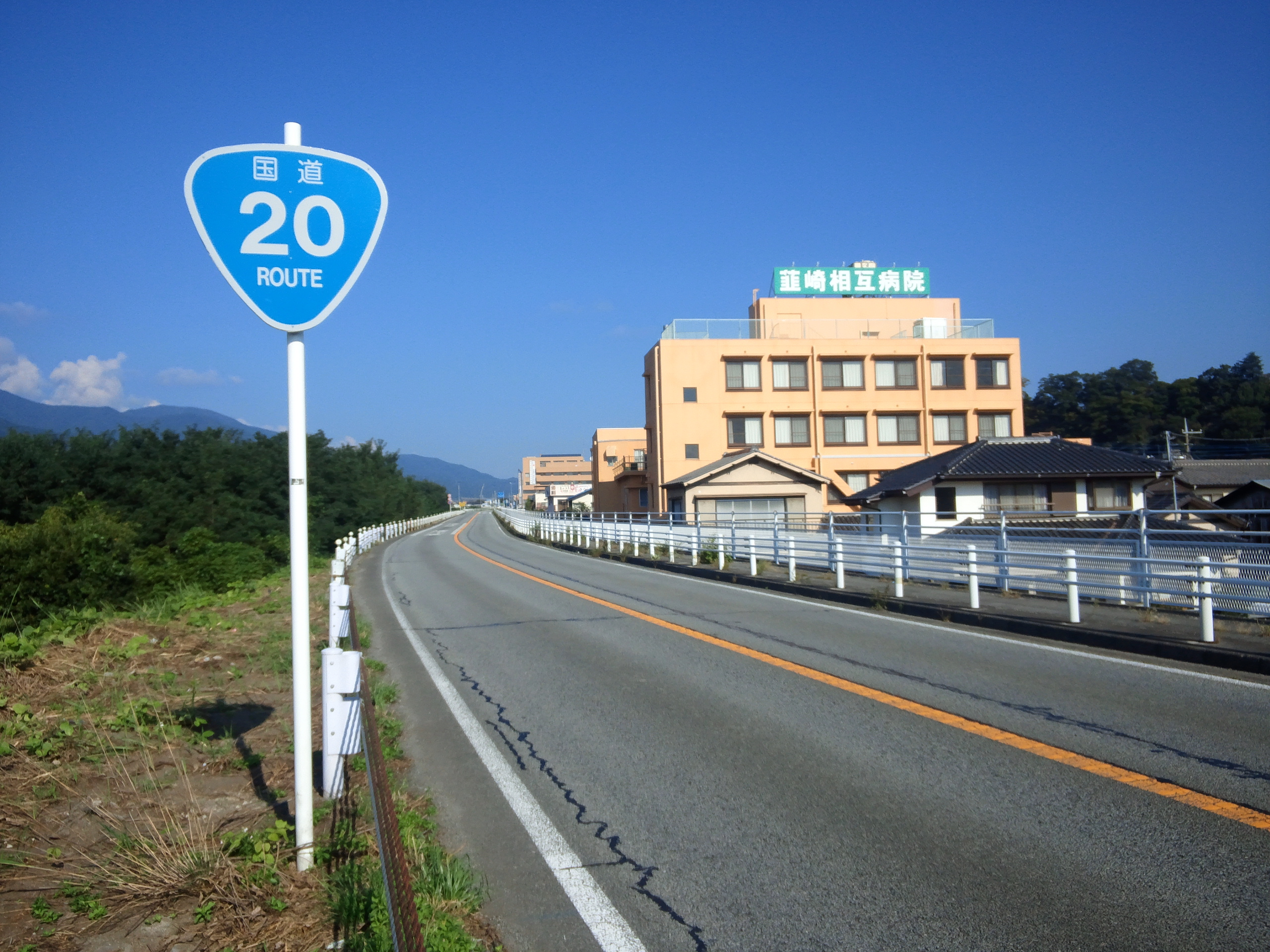 国道20号線(韮崎バイパス）山梨県韮崎市本町１丁目 付近（諏訪方面を撮影）